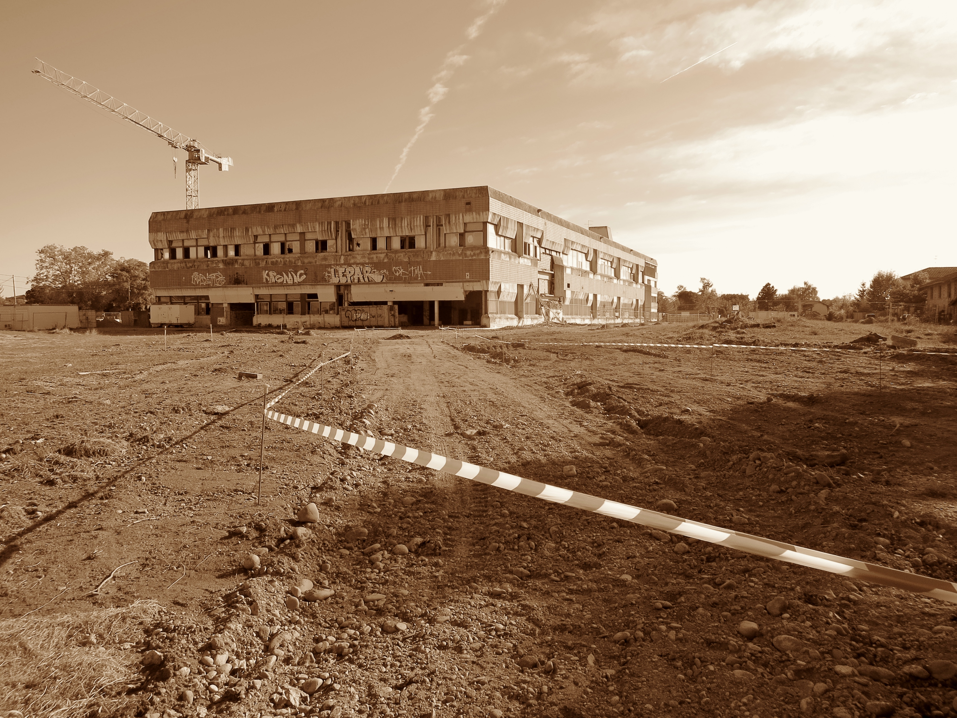 Toulouse (Haute-Garonne, Midi-Pyrénées, France) - L'ancien centre de tri postal de Lardenne (fermé en 2009) en désamiantage avant sa conversion en immeuble de logements.